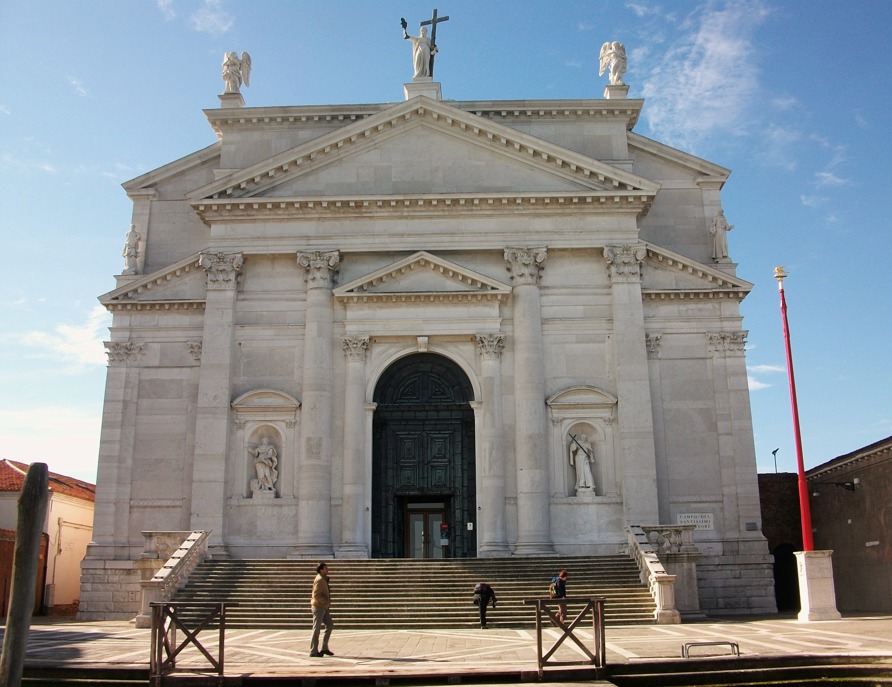 Façana de l'església del Redentore de Venècia.